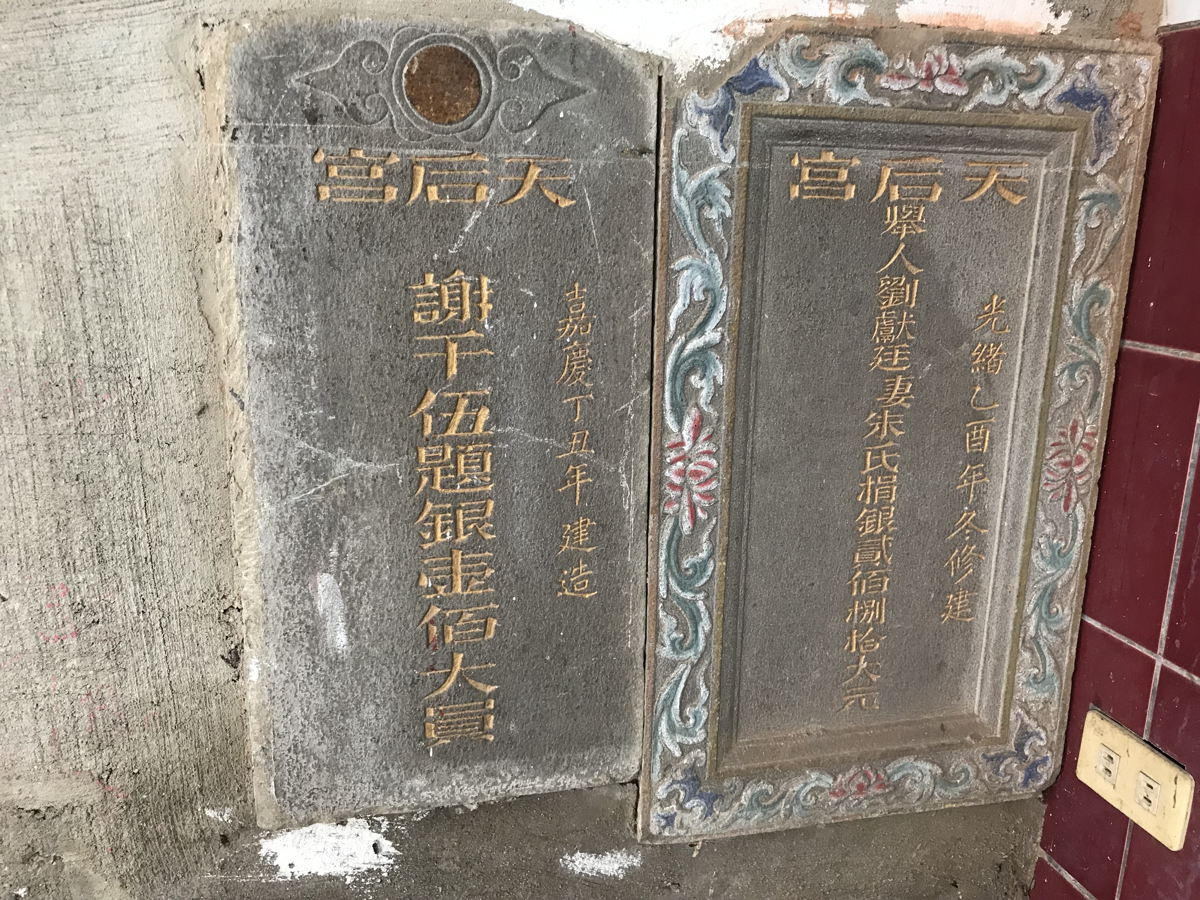 苗栗天后宮建廟與修廟石牌